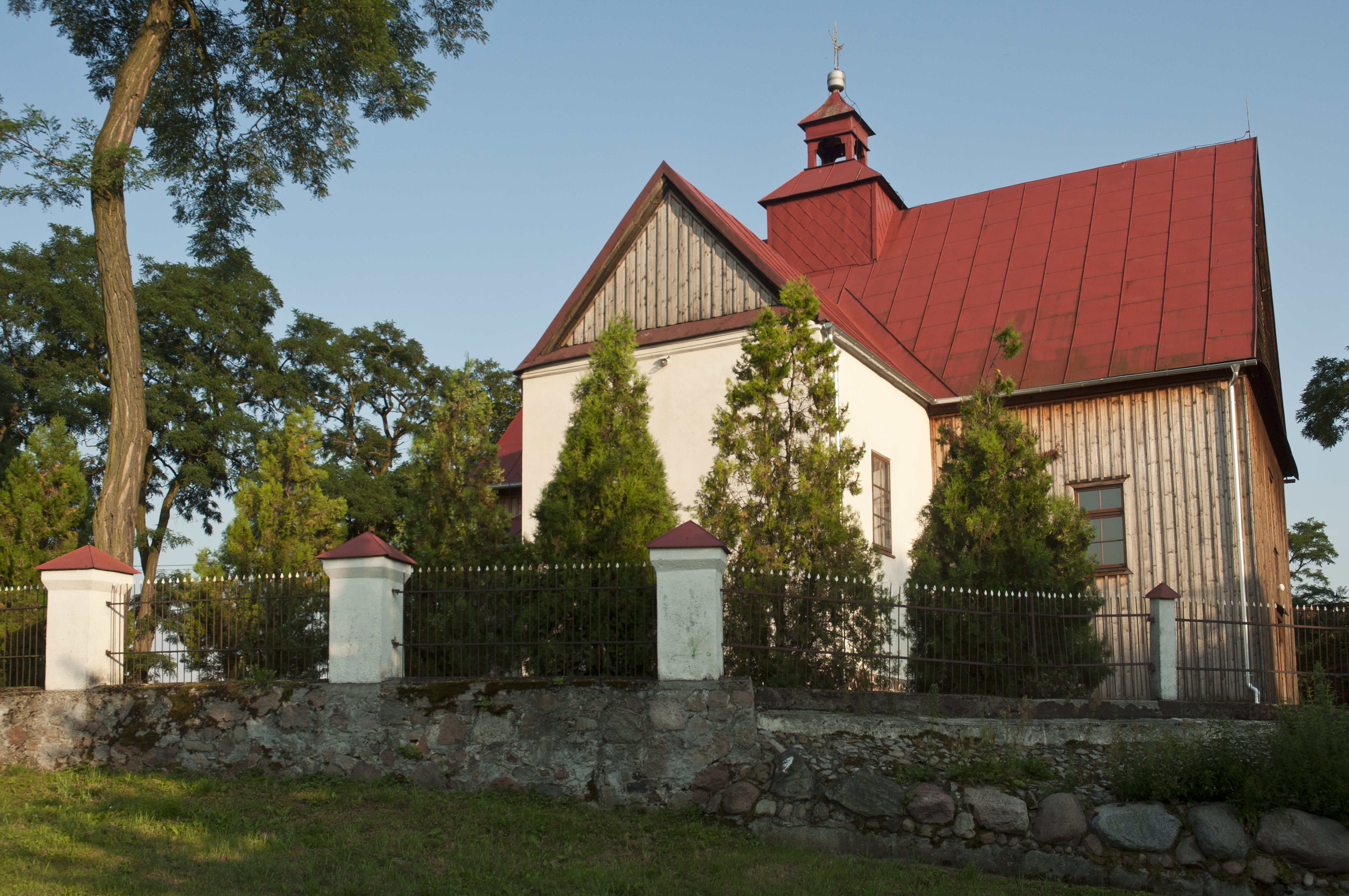 Golina, kościół par. p.w. św. Jakuba, 1765-1767